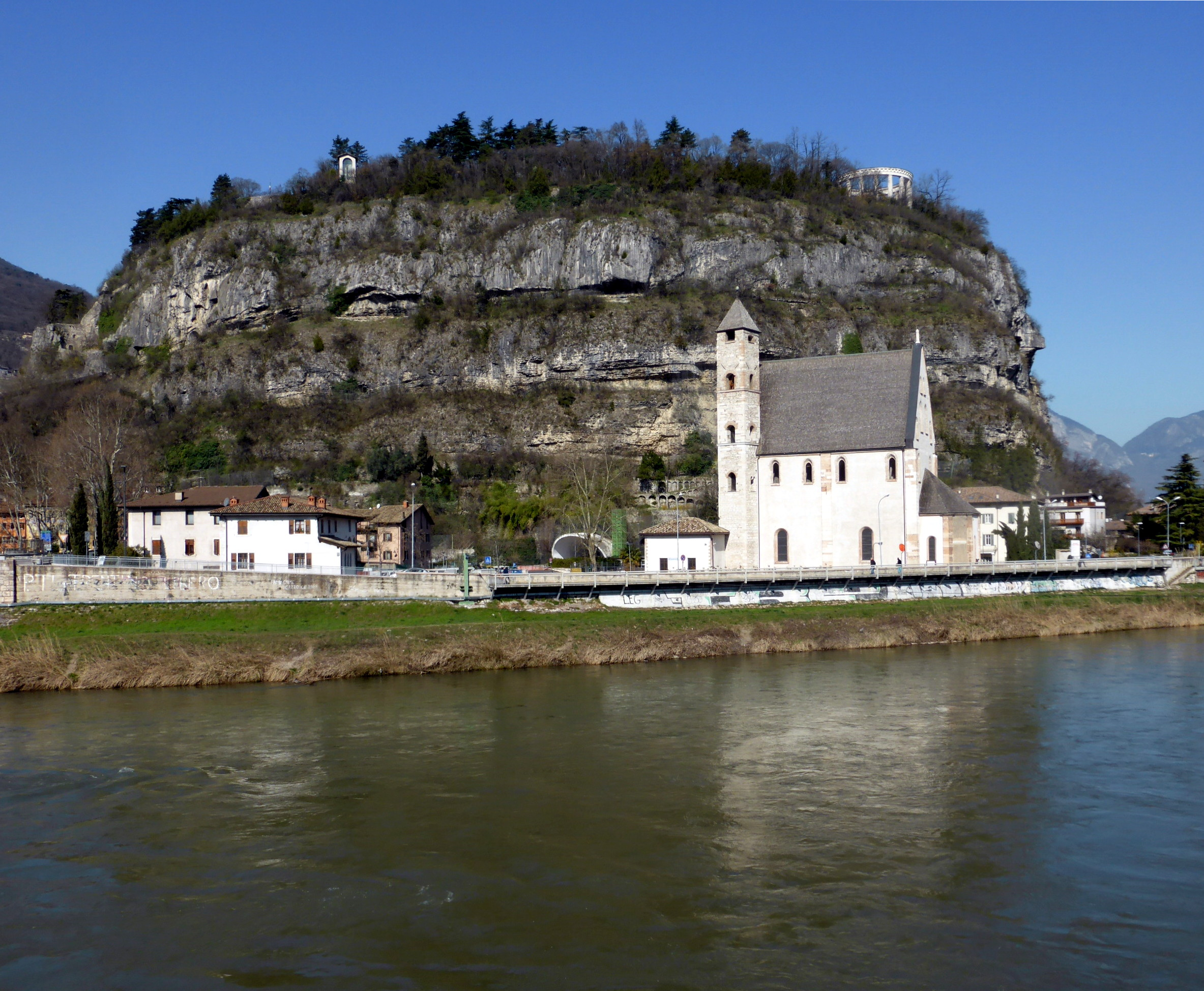 Der Doss Trento westlich von Trient; rechts die Kirche Sant'Apollinare; im Vordergrund die Etsch.